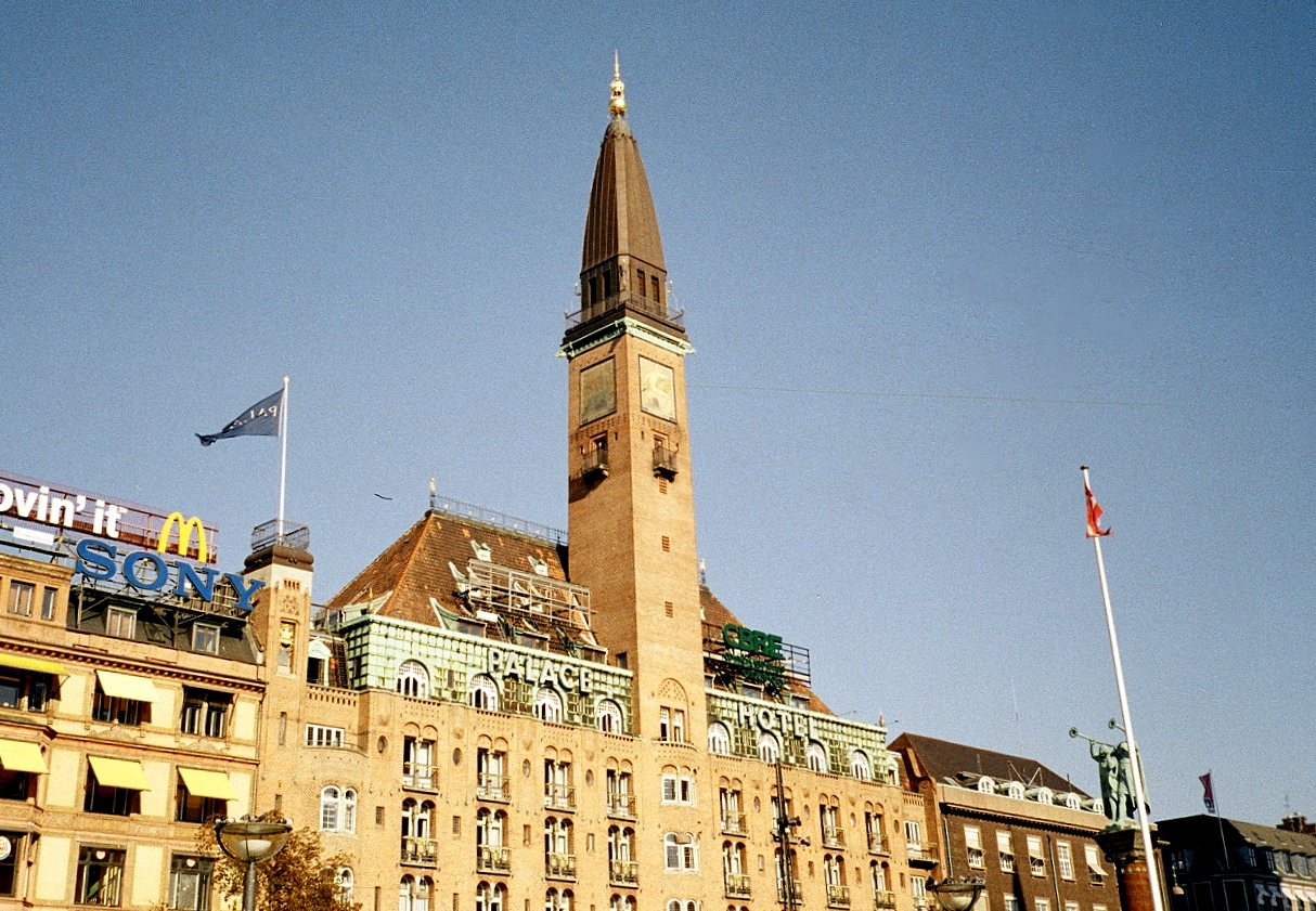 Palace Hotel, Rådhuspladsen, København. Bygget 1907-1910. Arkitekt: Anton Sofus Rosen.